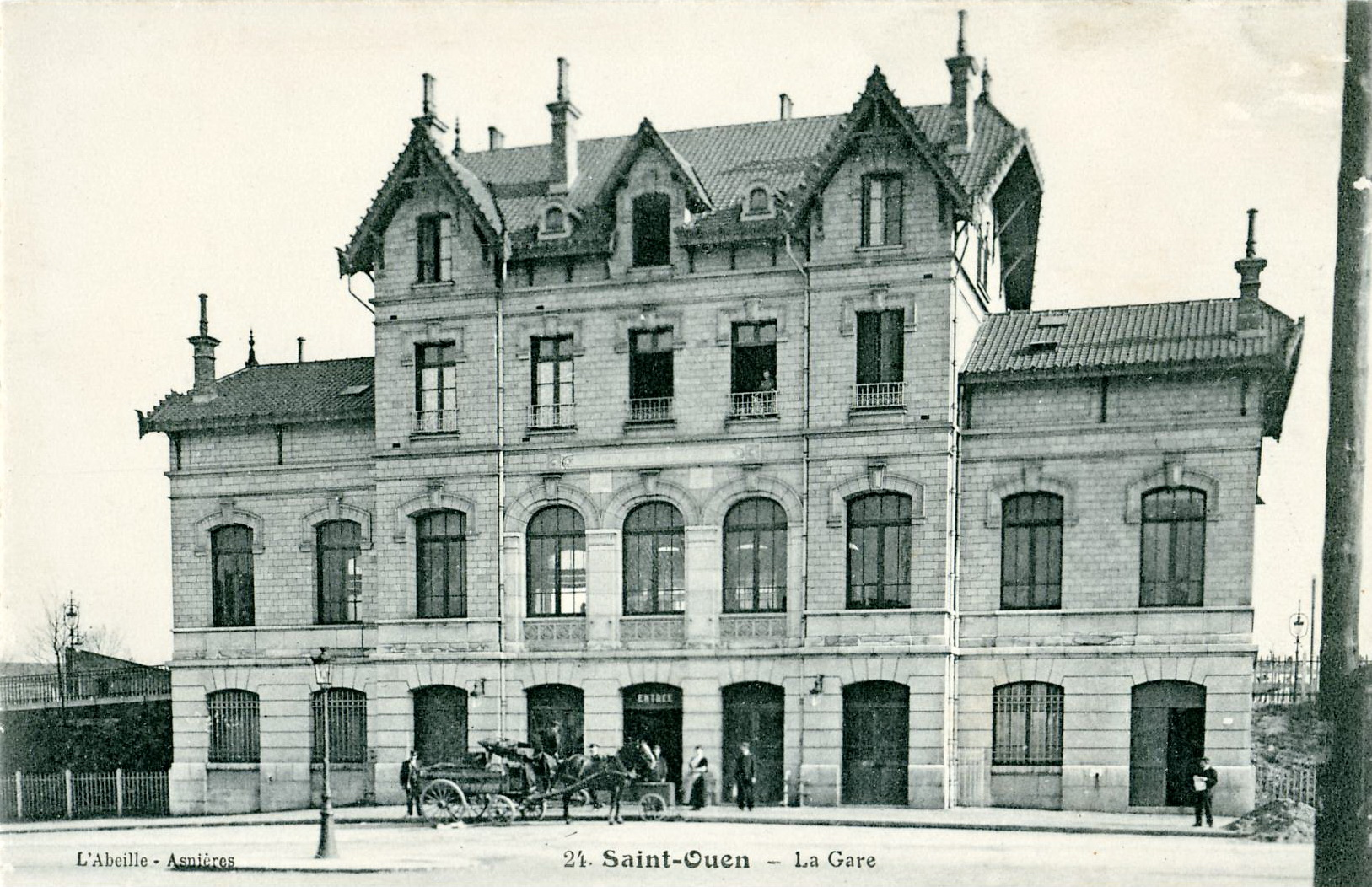 Carte postaler ancienne éditée par Abeille, N°24 SAINT-OUEN : La gare Nota : Il s'agit de la gare désaffectée sur la Ligne de Saint-Ouen-les-Docks (ou Ligne des Grésillons)